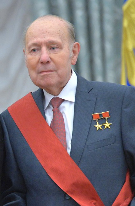 Genrikh Novozhilov